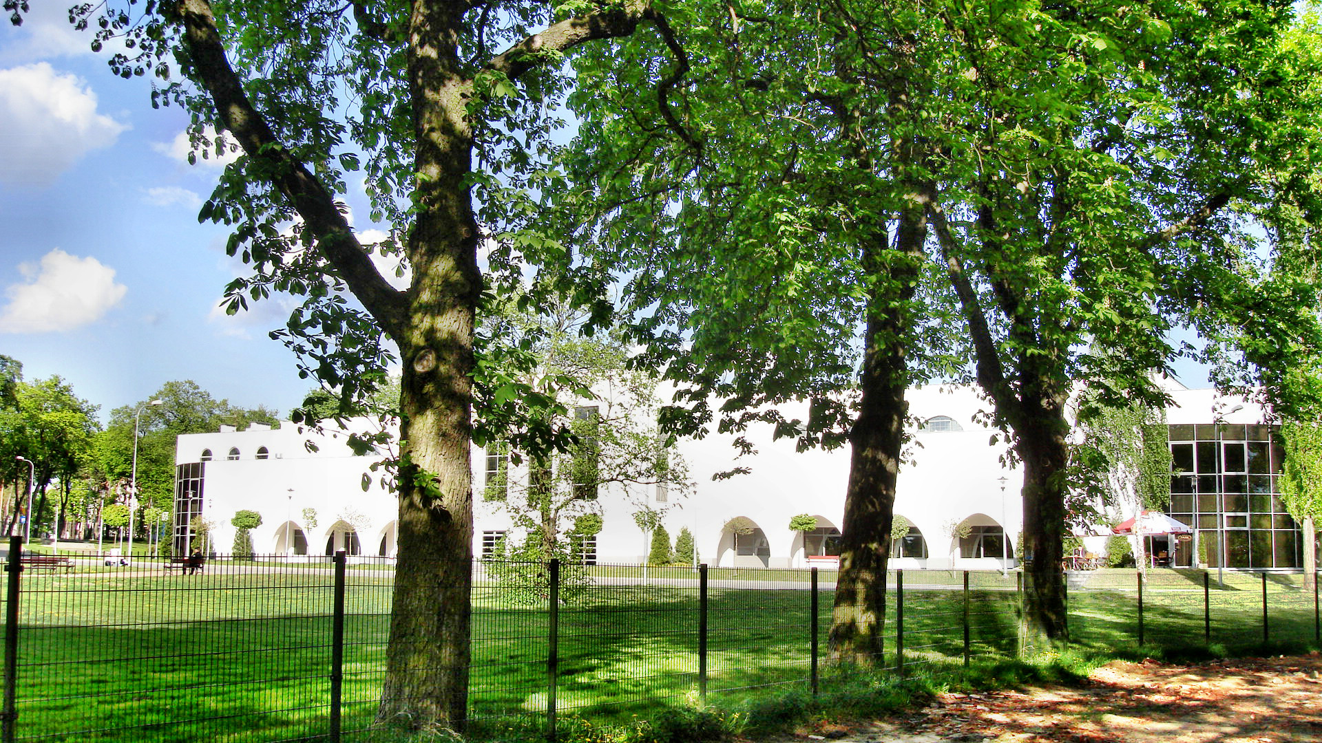 Hala targowa w Toruniu